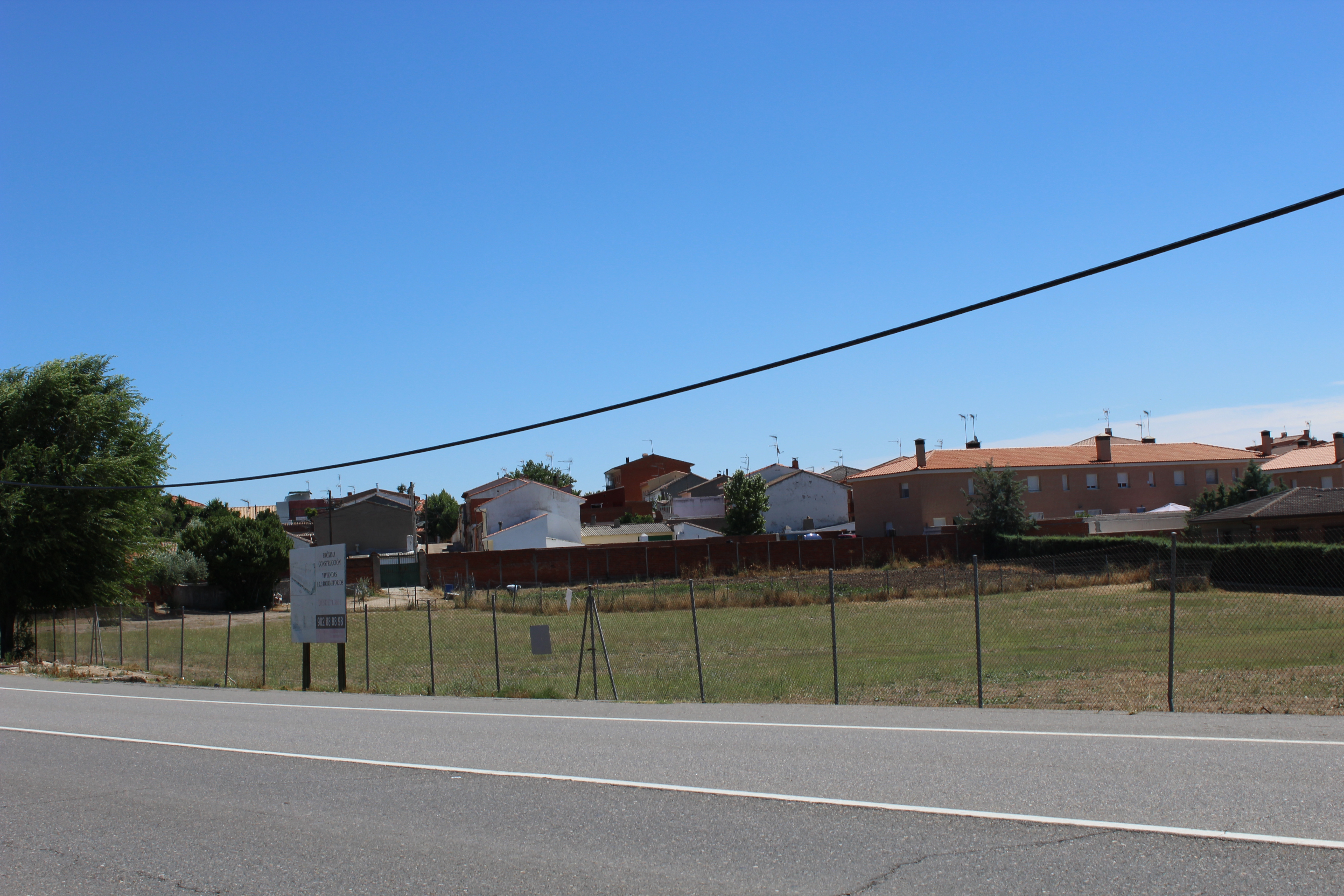 Quismondo.